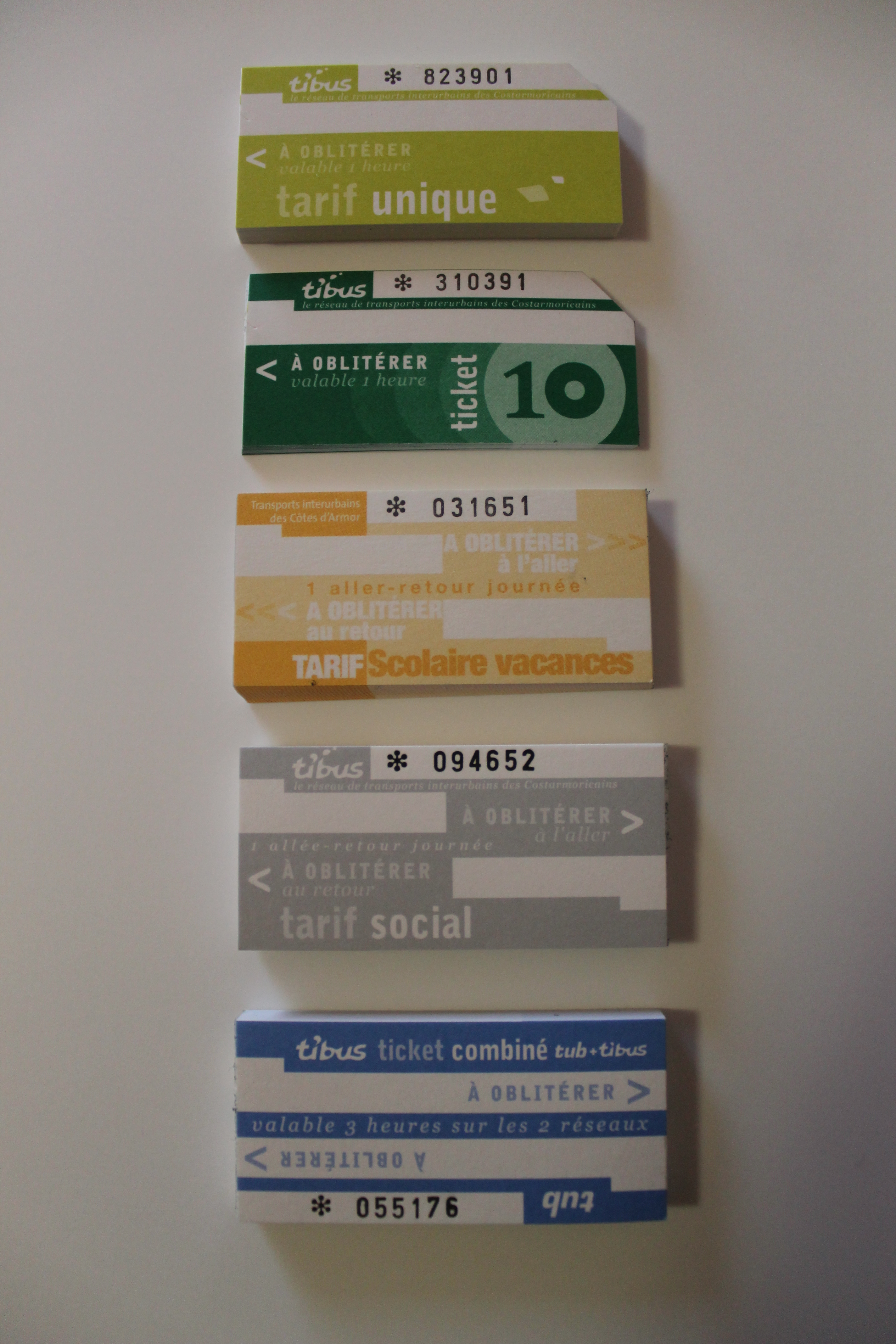 Tickets Ti'Bus